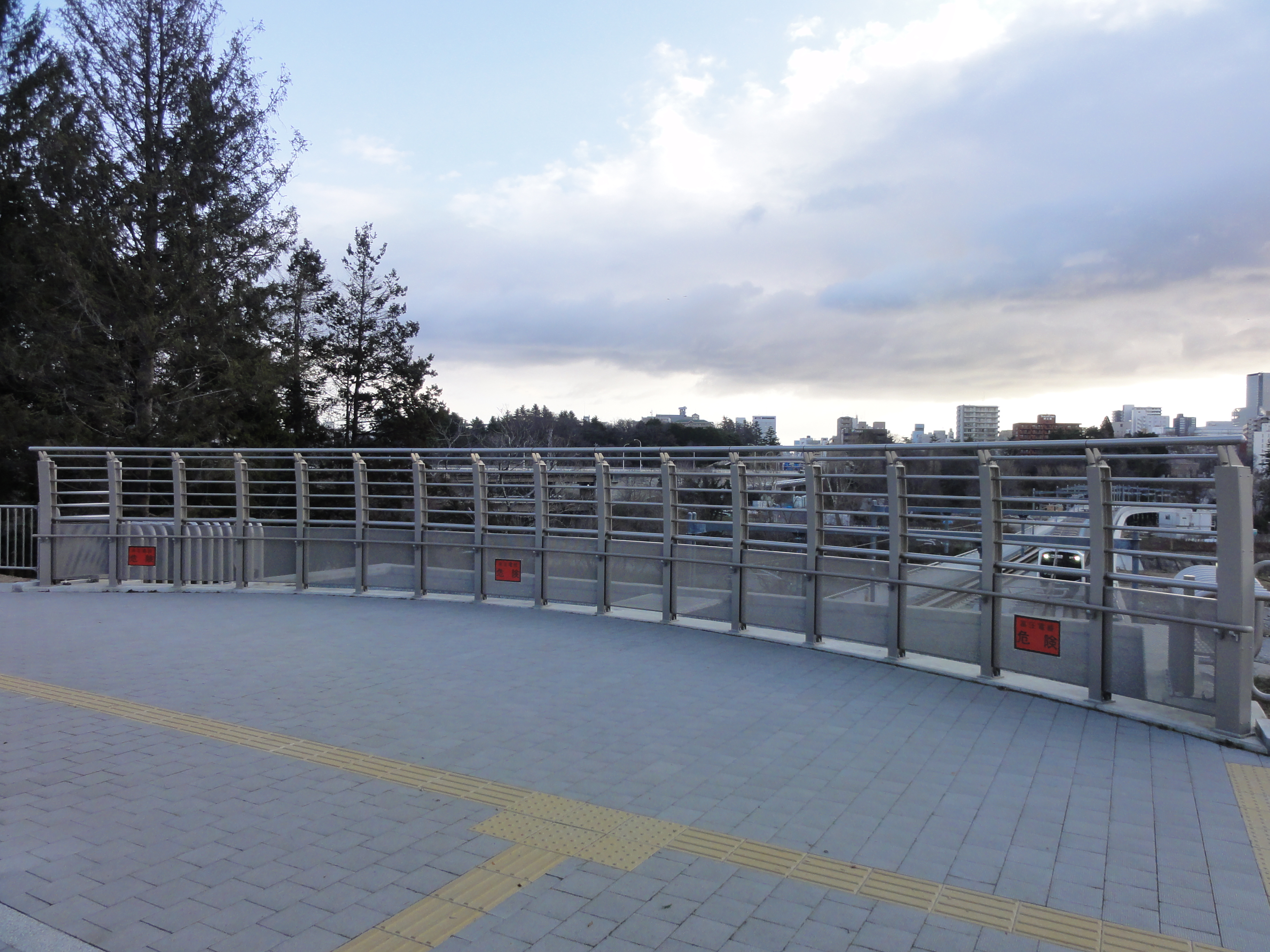 国際センター駅1階東側にある大町西公園駅方面を眺めることができるスペース